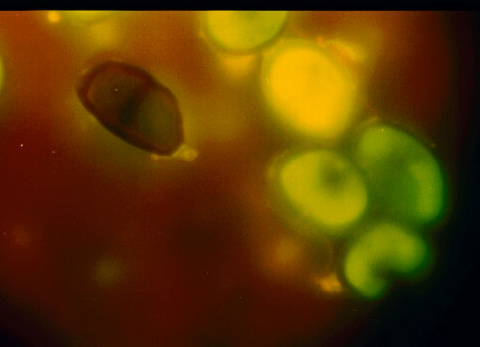 Sporen von Rostpilzen. Puccinia vincae Plowr. Fluoreszenzmikroskopie,Acridinorange-Färbung